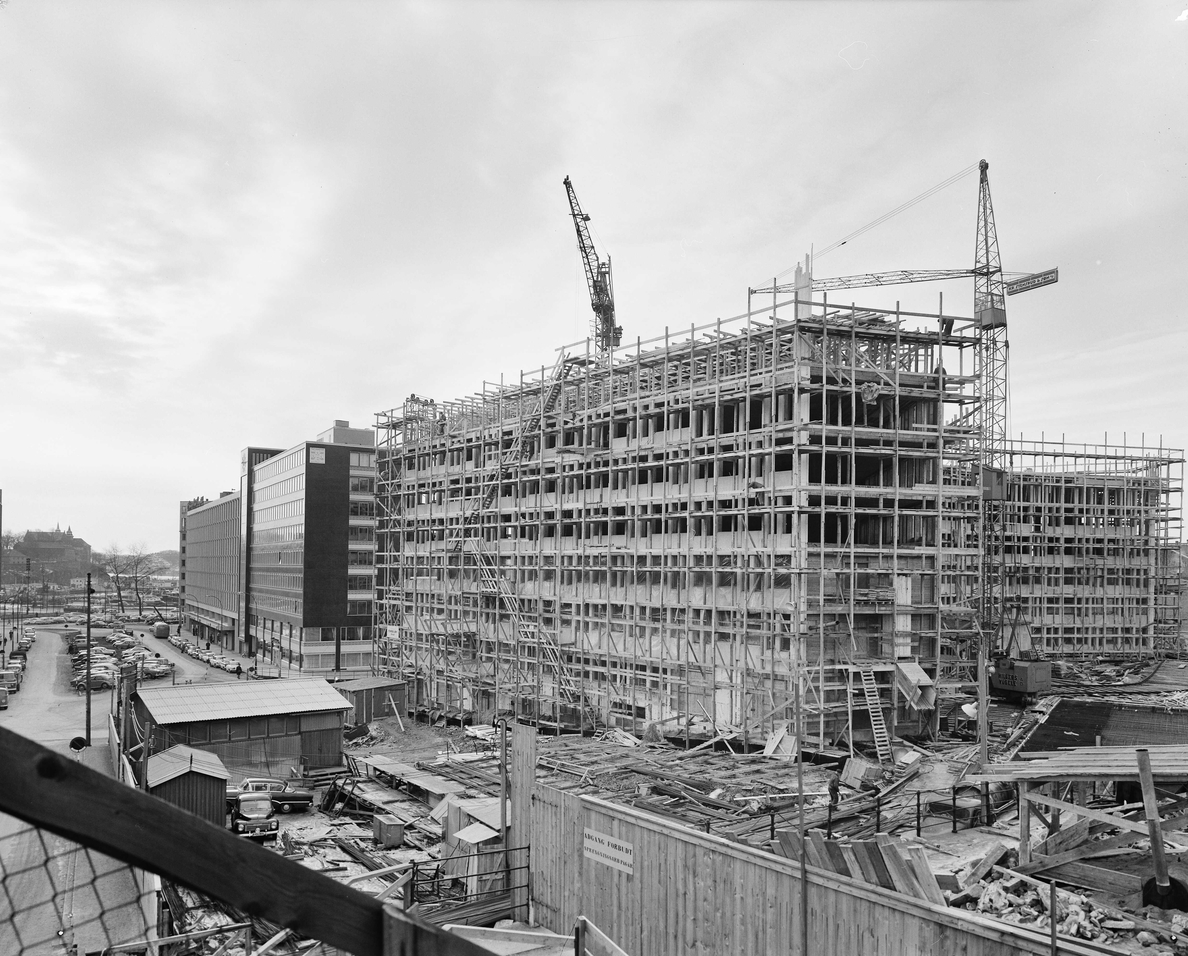 Byggevirksomhet i Haakon VIIs gate i 1962. Storebrandbygget (nr. 10) er under oppføring, mens nr. 2 og 6 er ferdigbygd. Foto: Leif Ørnelund. Fra Byhistorisk samling hos Oslo Museum.